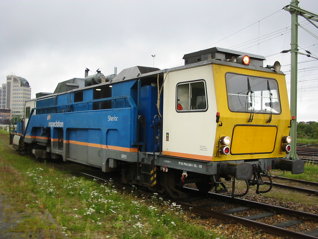 Videoschouwtrein VolkerRail op spoor 325 te Deventer